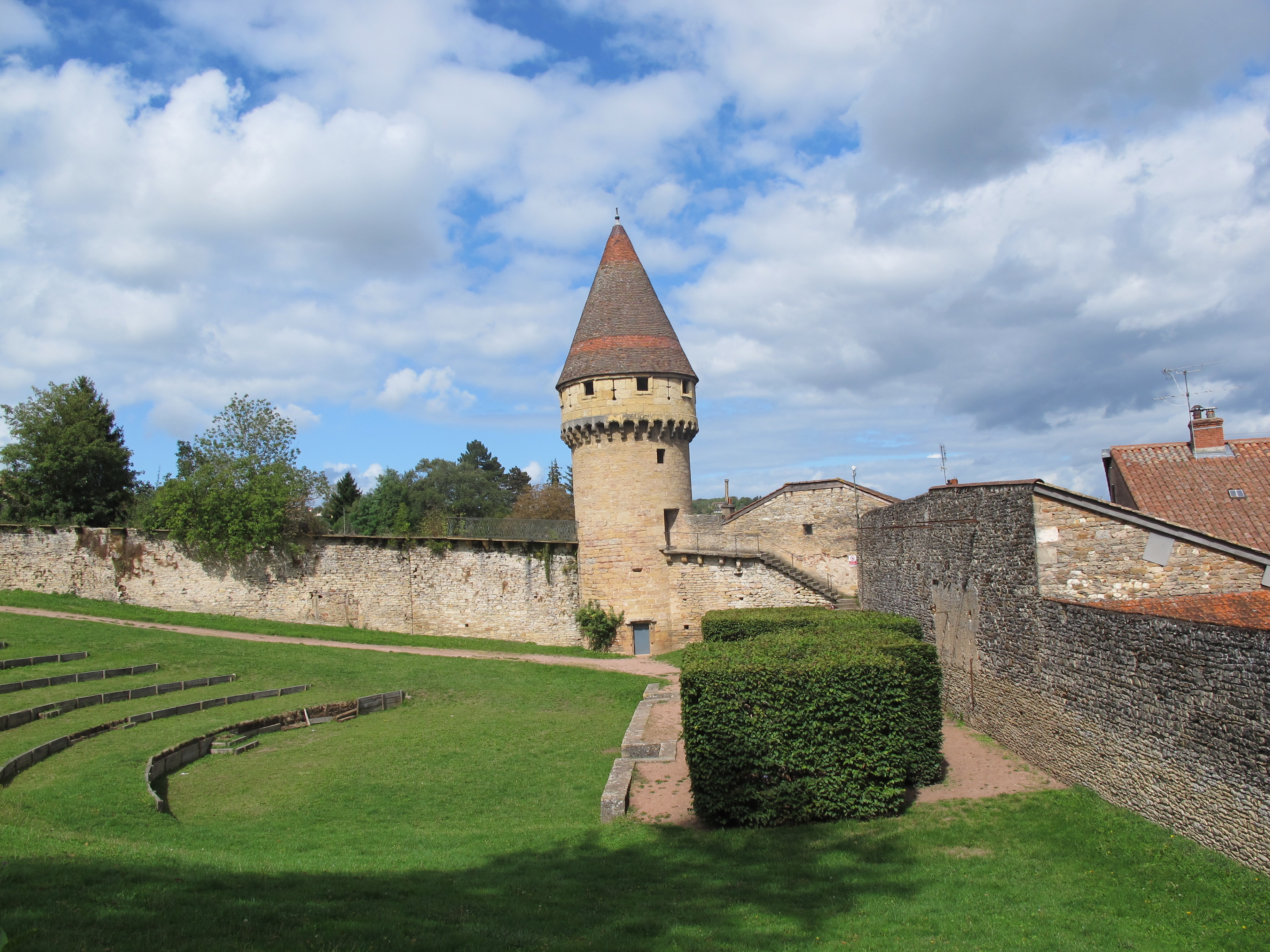 Tour Fabry de la Clôture de l'abbaye de Cluny